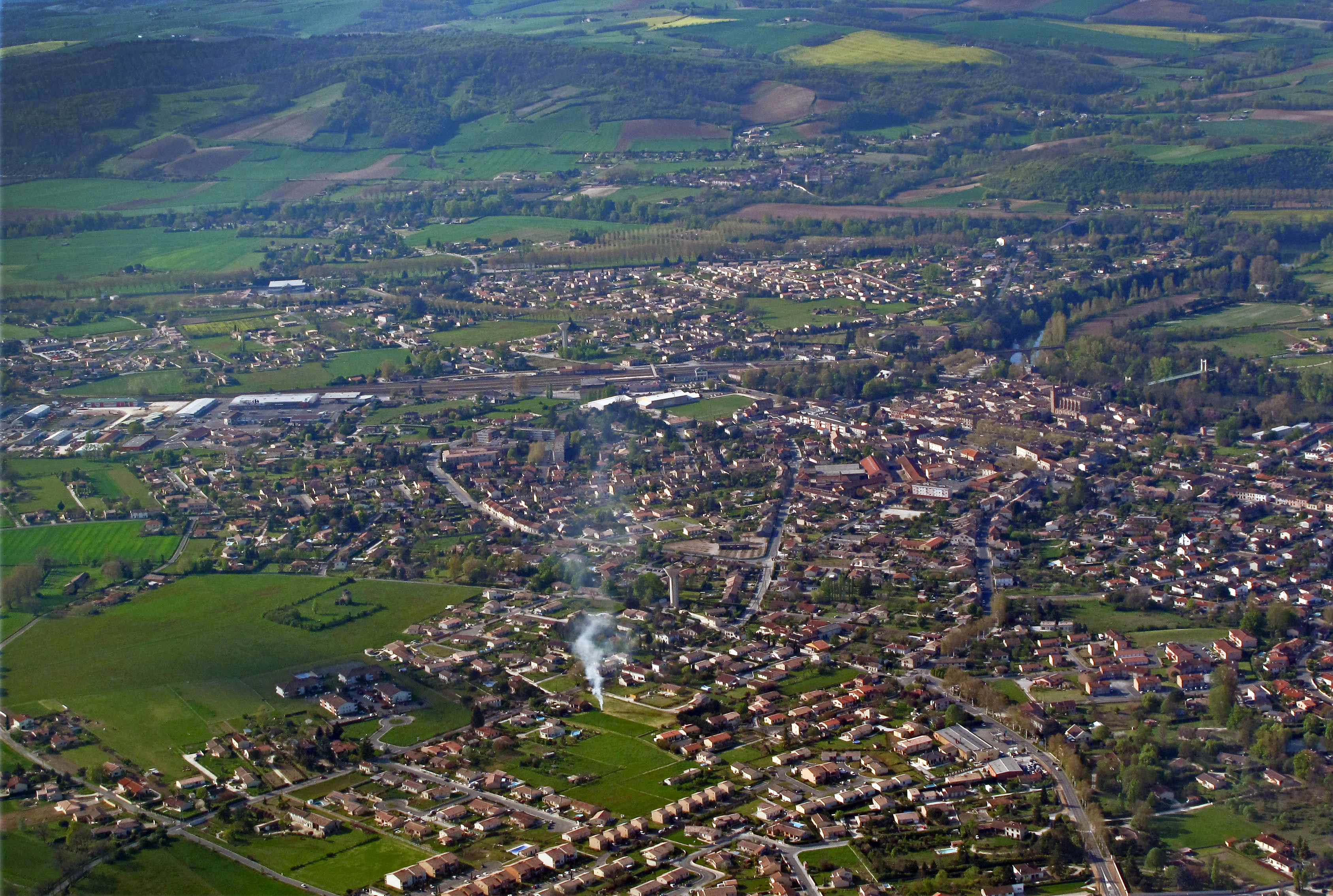 Vue aérienne de Saint-Sulpice (Tarn) depuis un Aquila AT01 F-GZPL.